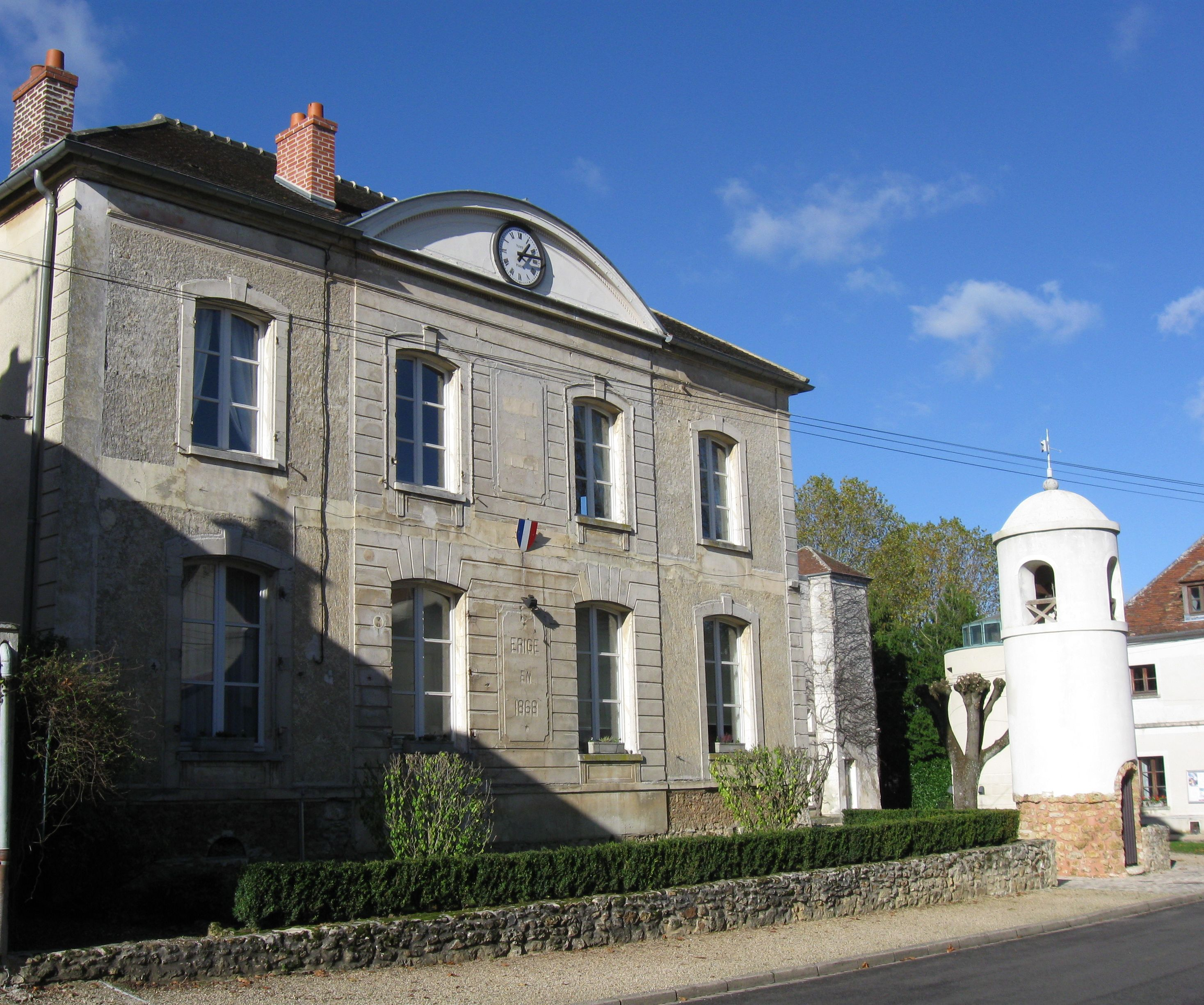 Mairie de Montceaux-lès-Meaux. (Seine et Marne, région Île-de-France).